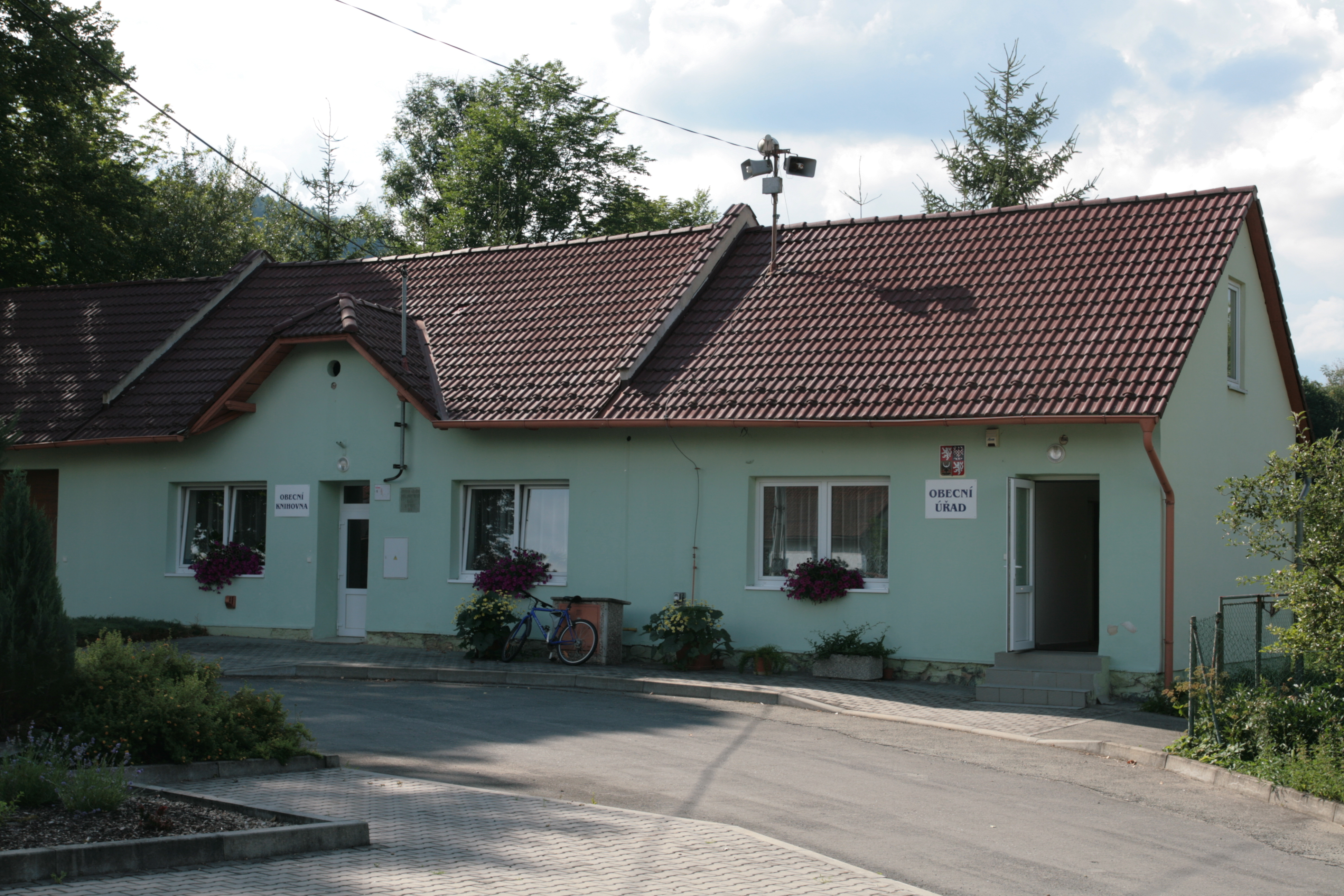 Obec Stvolová v okrese Blansko. Obecní úřad s knihovnou a hasičskou zbrojnicí.